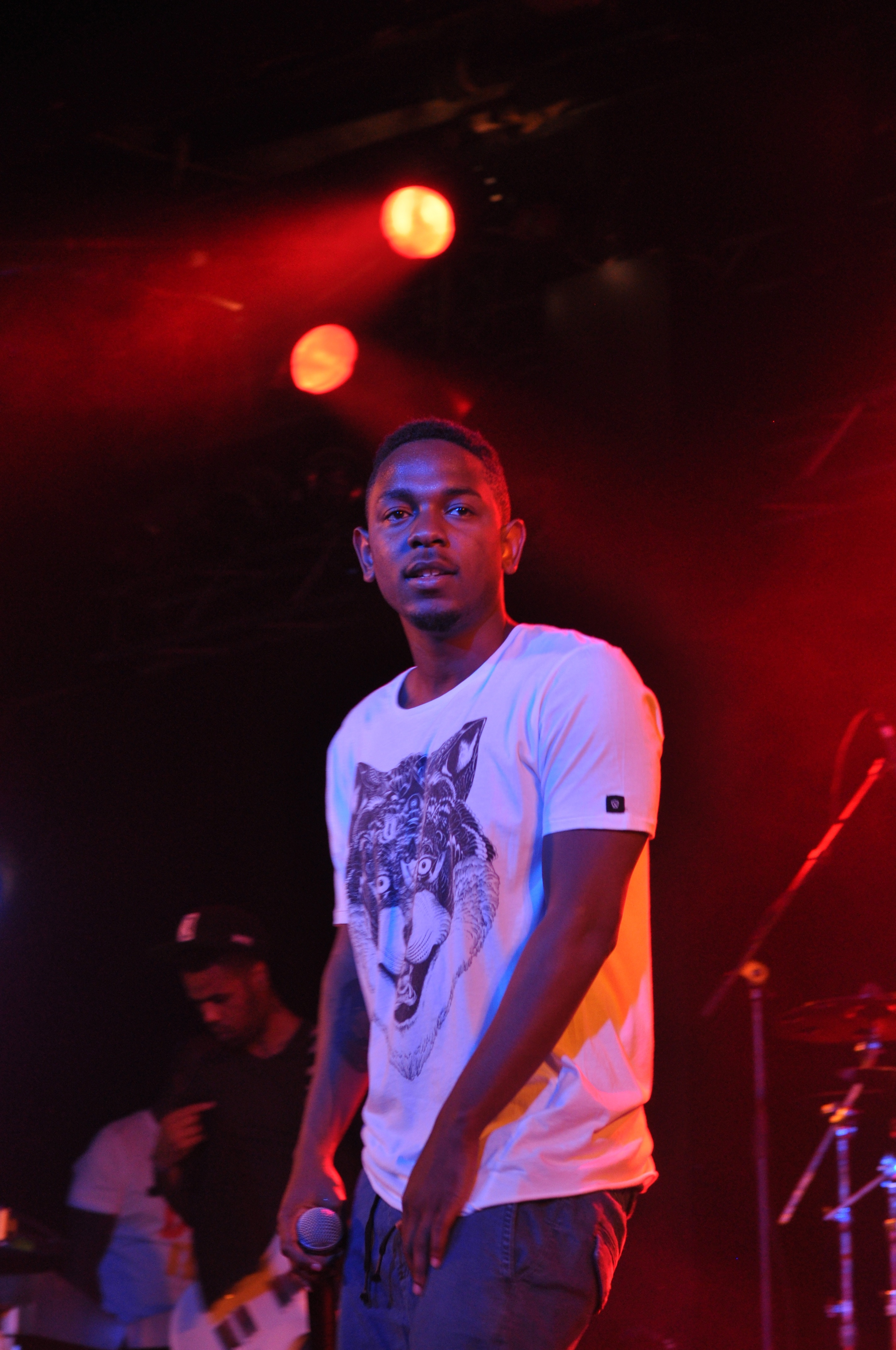 Kendrick Lamar @ Grosse Freiheit 36, Hamburg